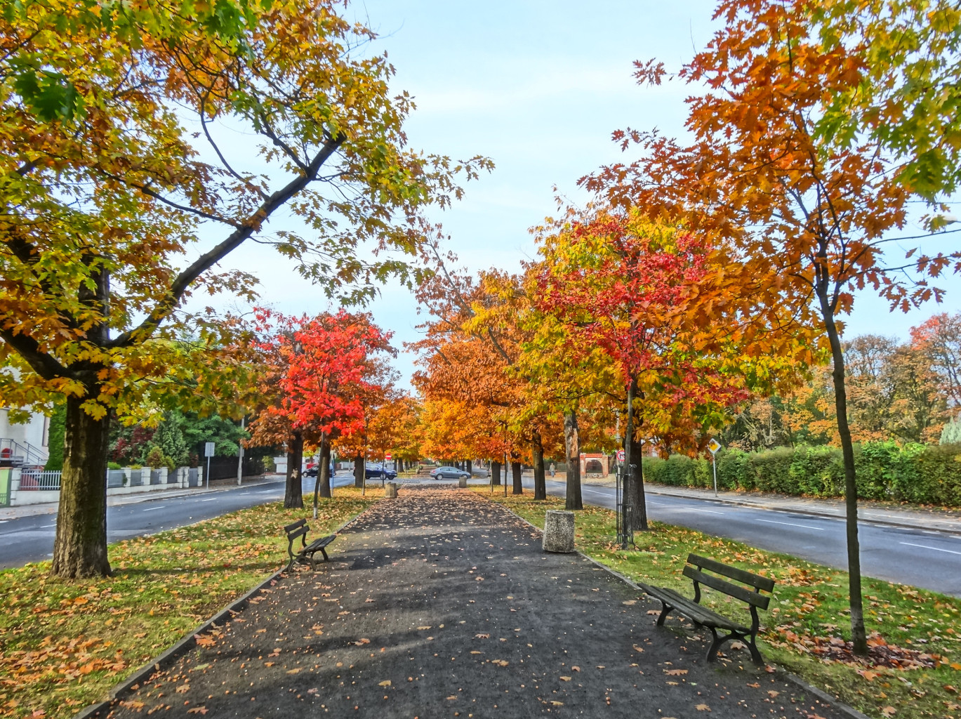 Aleja Ossolińskich w Bydgoszczy aleja dębów czerwonych (posadzone ok. 1908 r.)